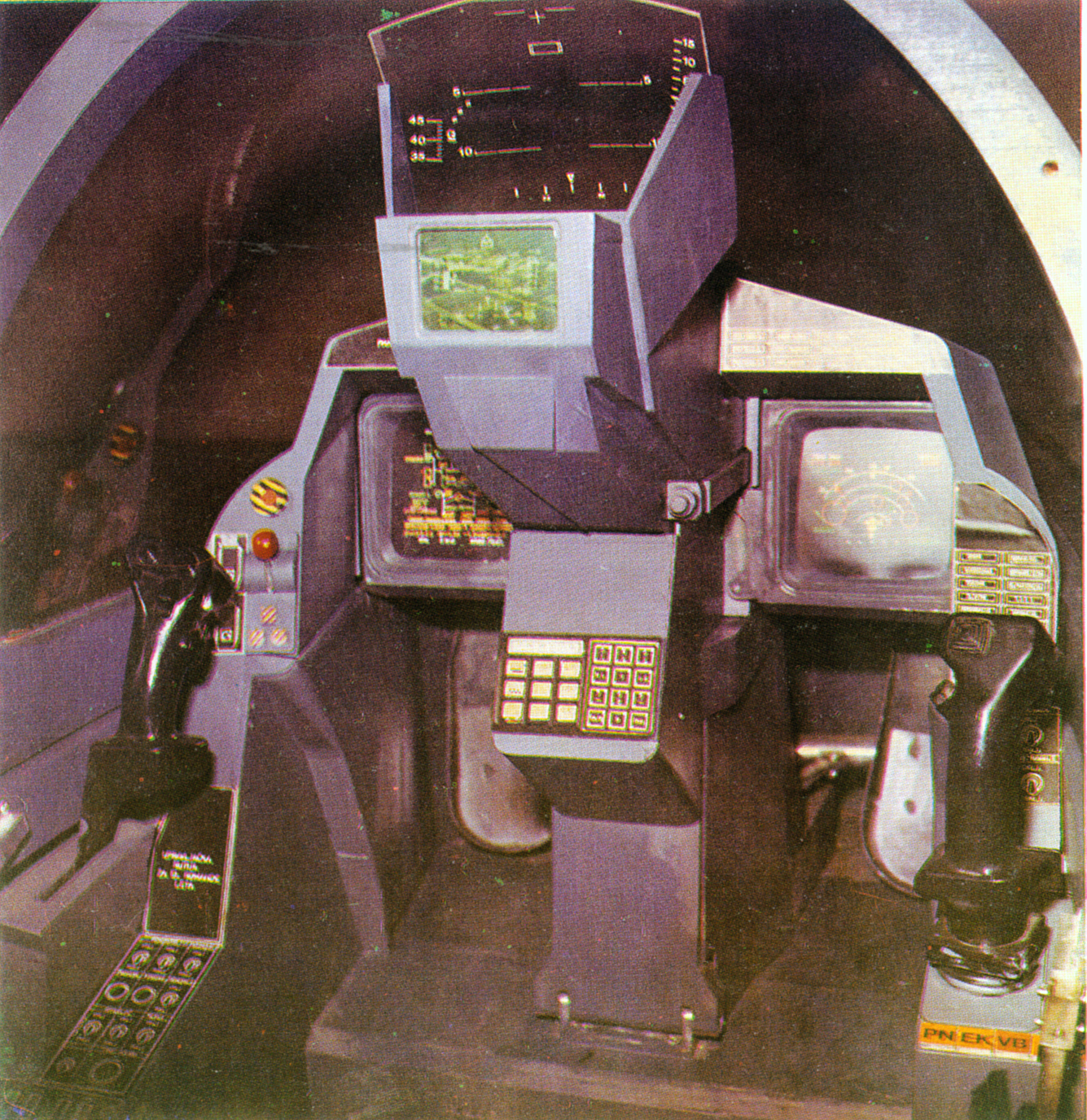 Model kabine Novog aviona